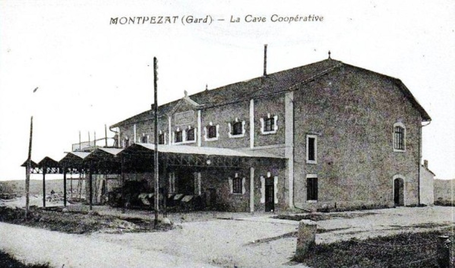 Cave coopérative Les Coteaux de Montpezat